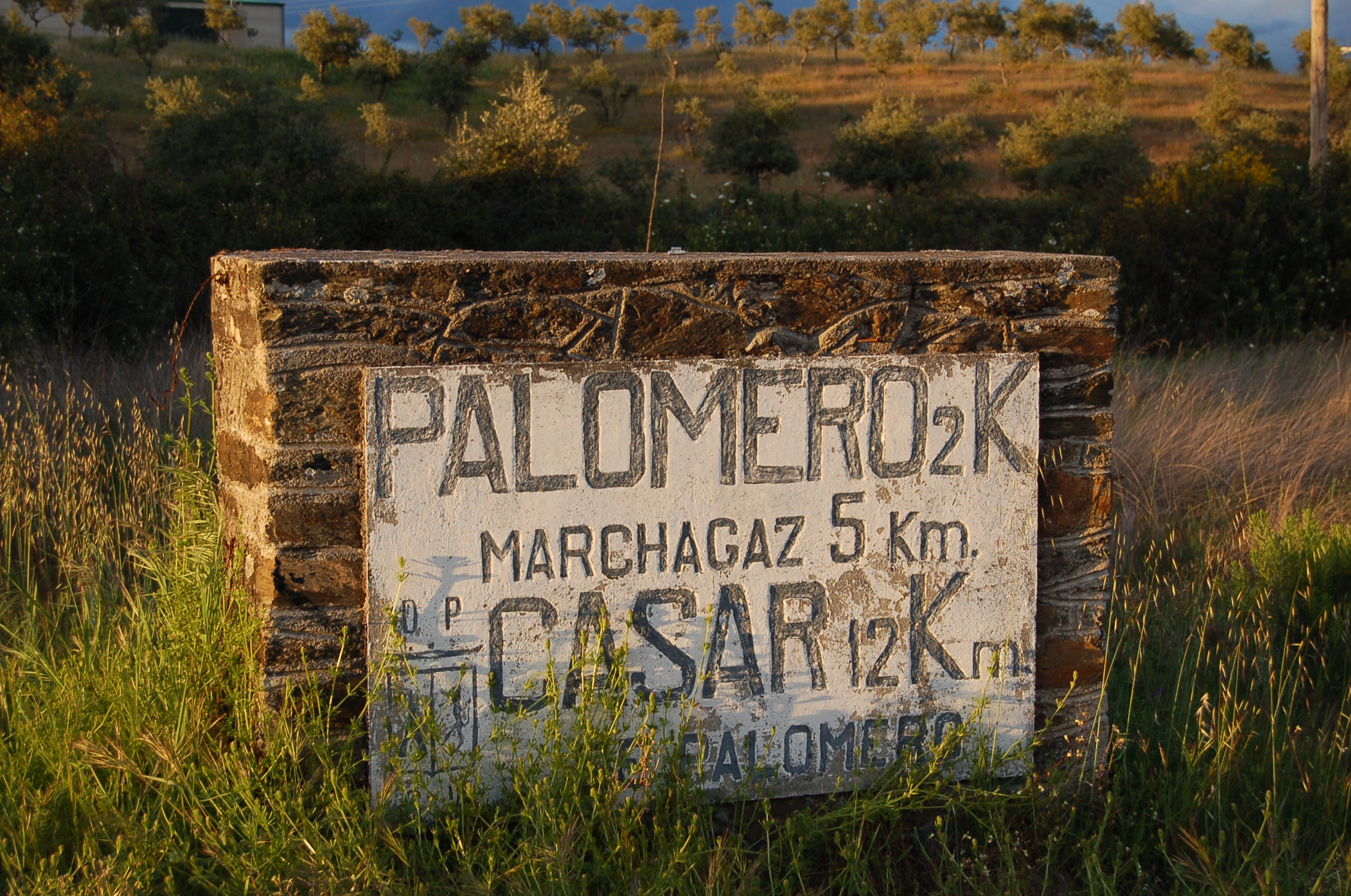 Letreiro de distancias a Palomero, Marchagaz y Casar de Palomero